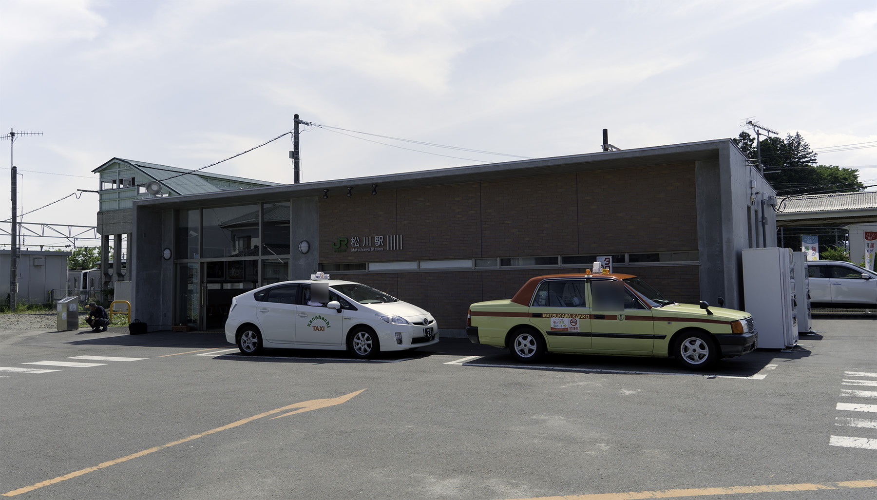 東日本旅客鉄道株式会社東北本線松川駅駅舎